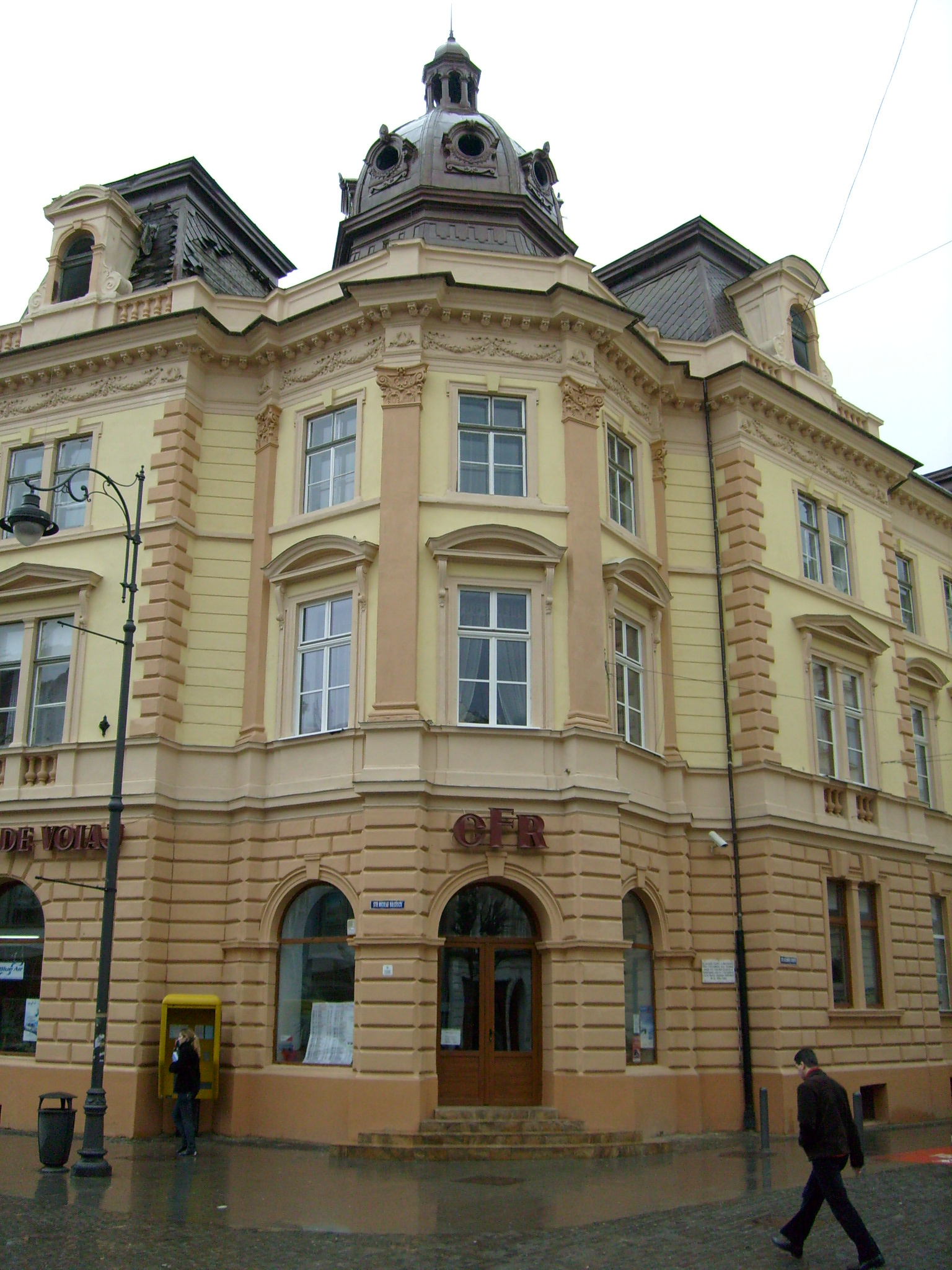 Fostul comandament al Armatei Imperiale Cezaro-Craiesti de la Sibiu. In acest edificiu a functionat Consiliul Dirigent al Transilvaniei.